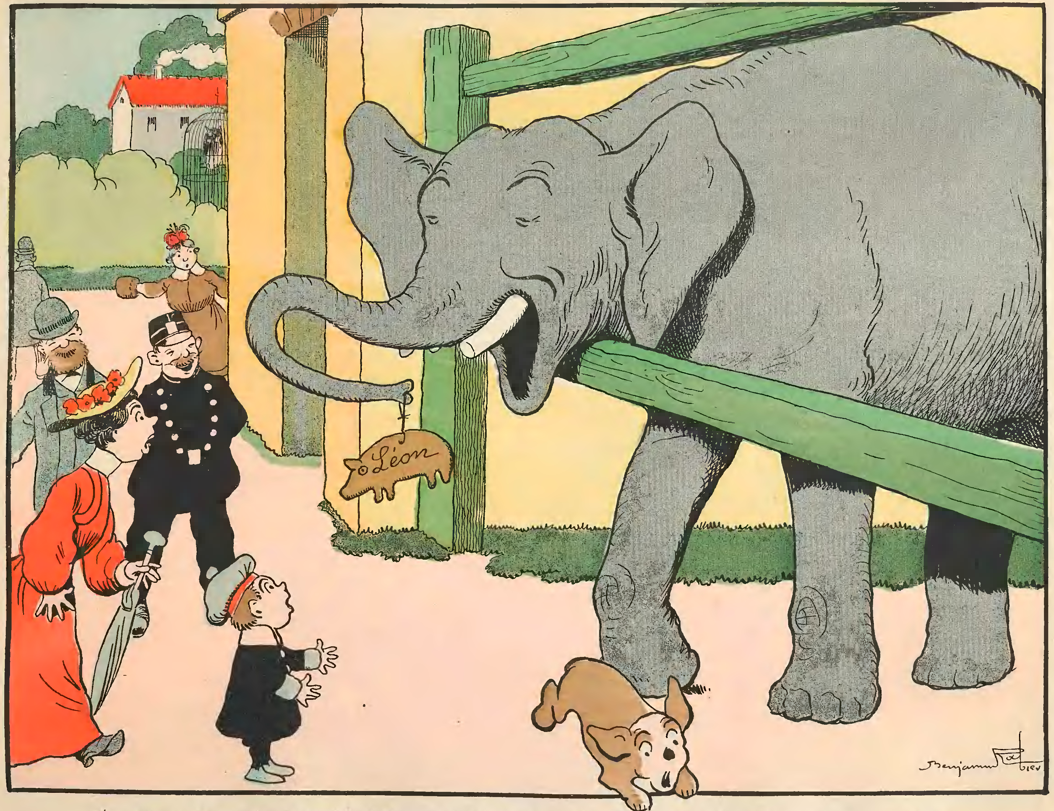 image page 59 du djvu